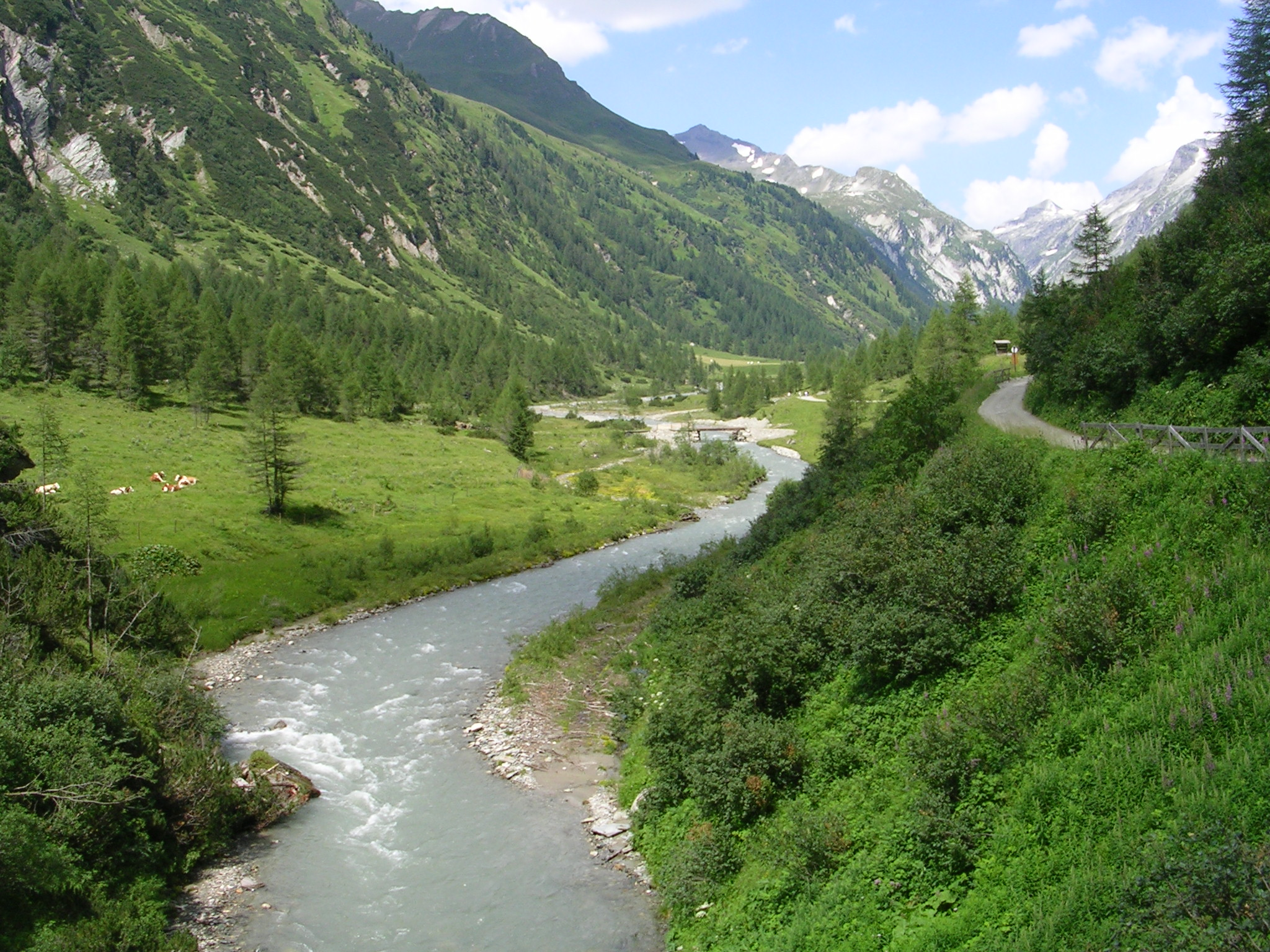 Das Kalser Dorfertal gesehen vom Ende der Daberklamm